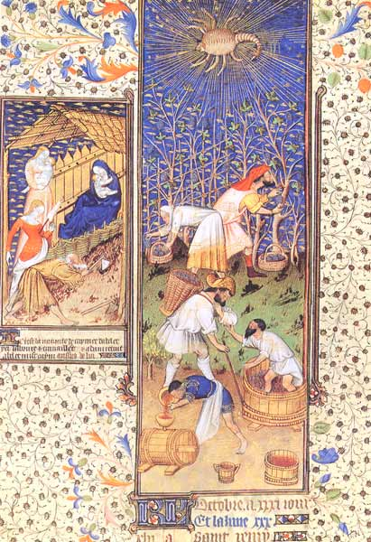 Les vendanges; calendrier d'octobre; côté verso: les travaux d'Adam et Eve Maître de Rohan et atelier, Les Grandes Heures de Rohan, 1430 Paris, BnF, Département des manuscrits, Latin 94718 fol. 14v.